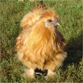 jeune coq Nègre Soie fauve